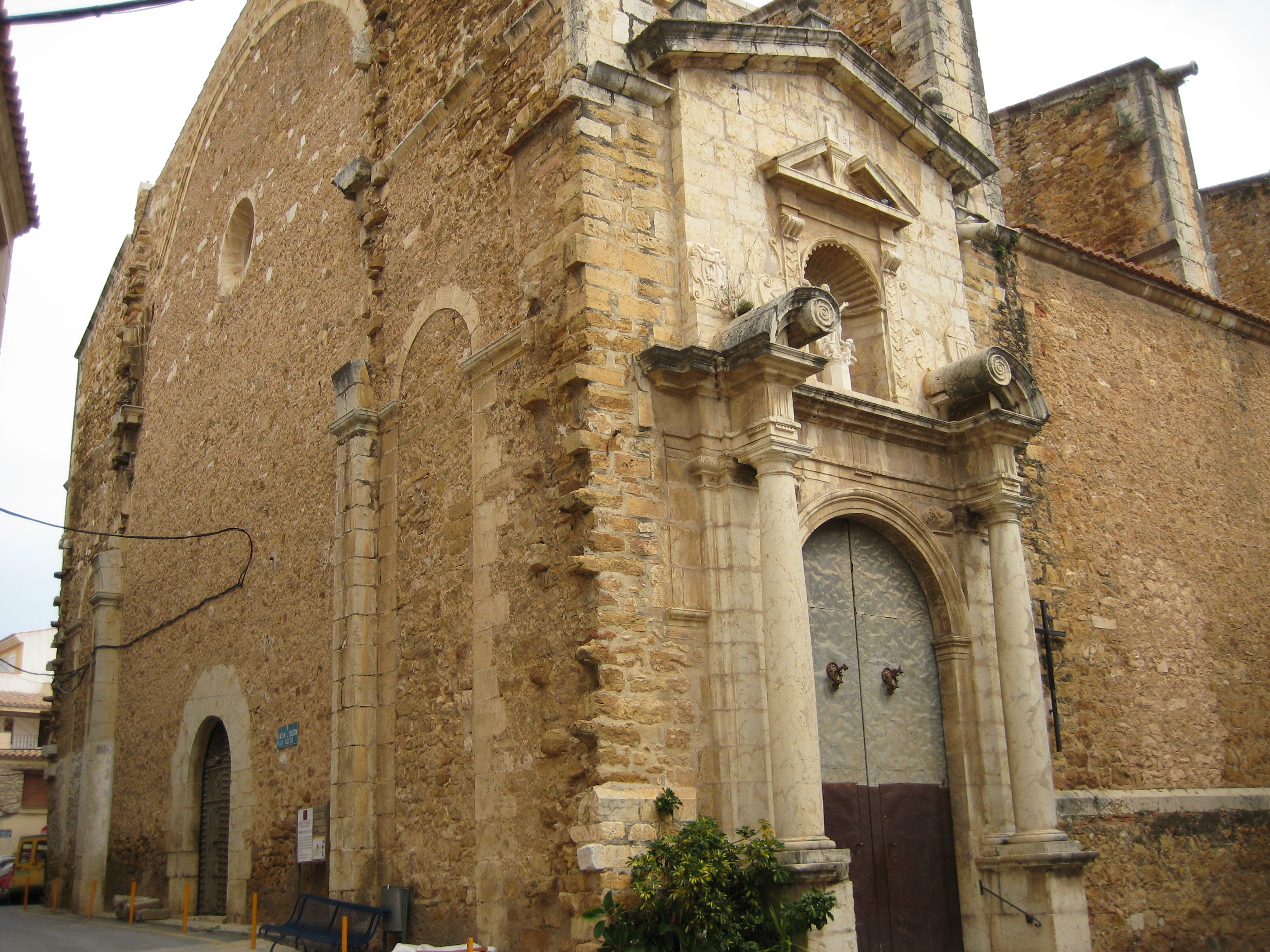 Església de l'Assumpció e Traiguera (Baix Maestrat)